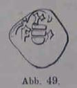 Böser Halser wahrscheinlich von Graf Friedrich, 1459 bis 1485, Hals